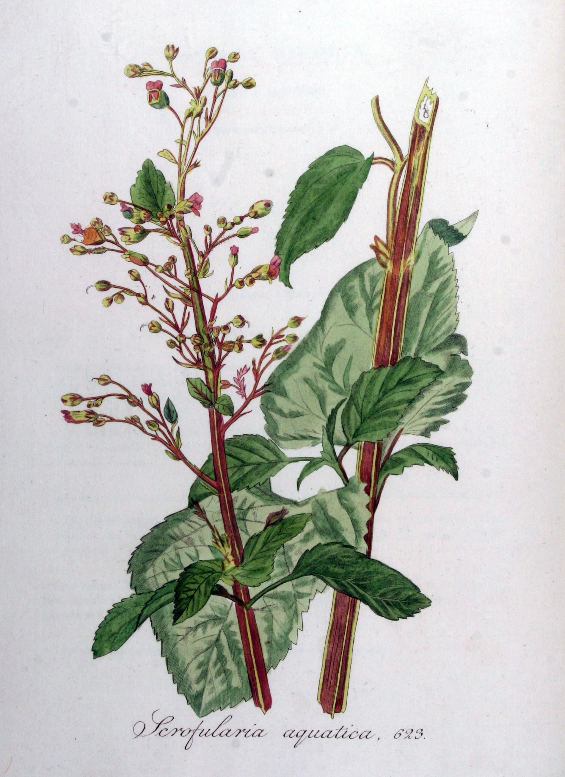 Scrophularia umbrosa Dum. subsp. umbrosa (Syn. Scrophularia aquatica L. nom rejic.)